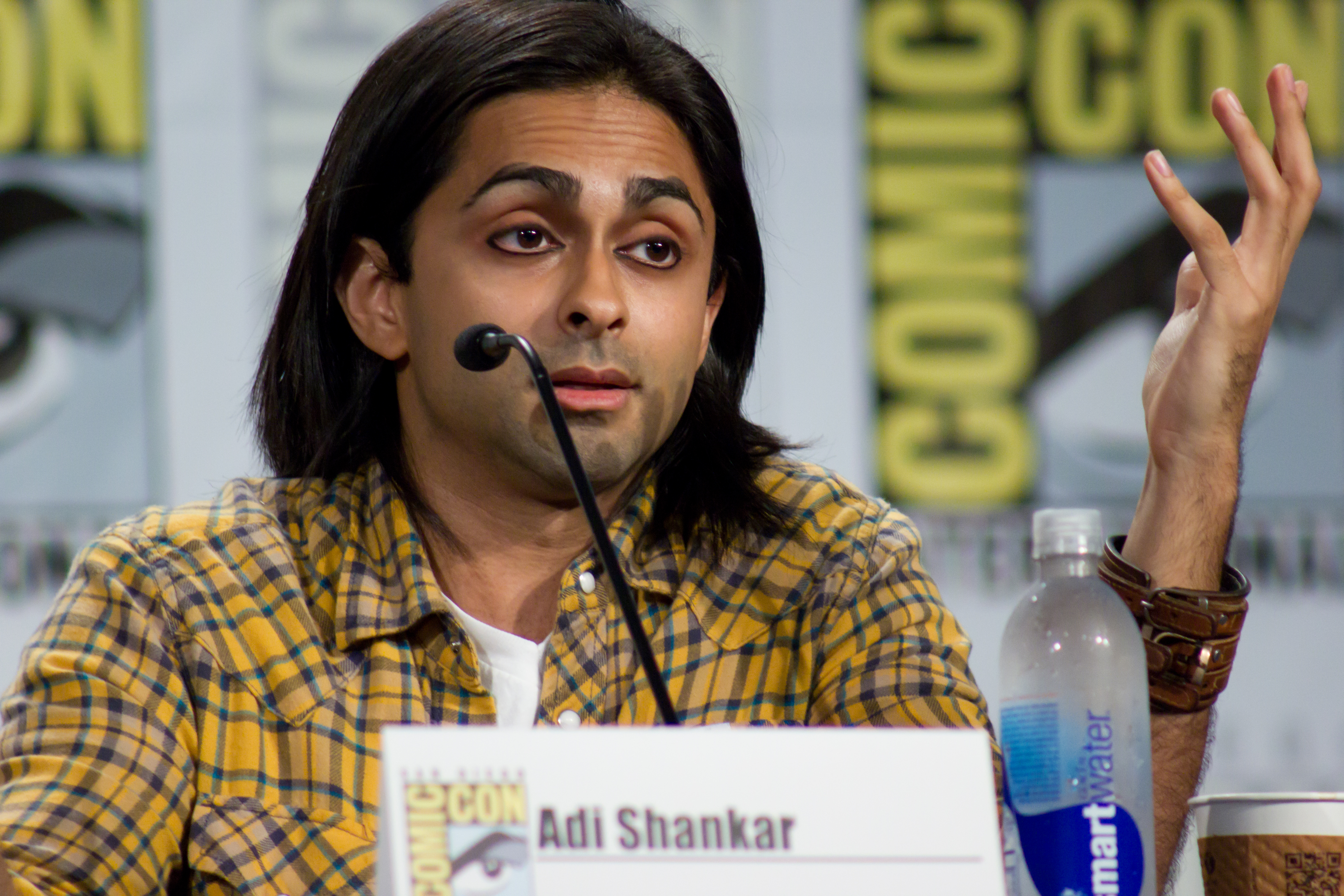 Adi Shankar